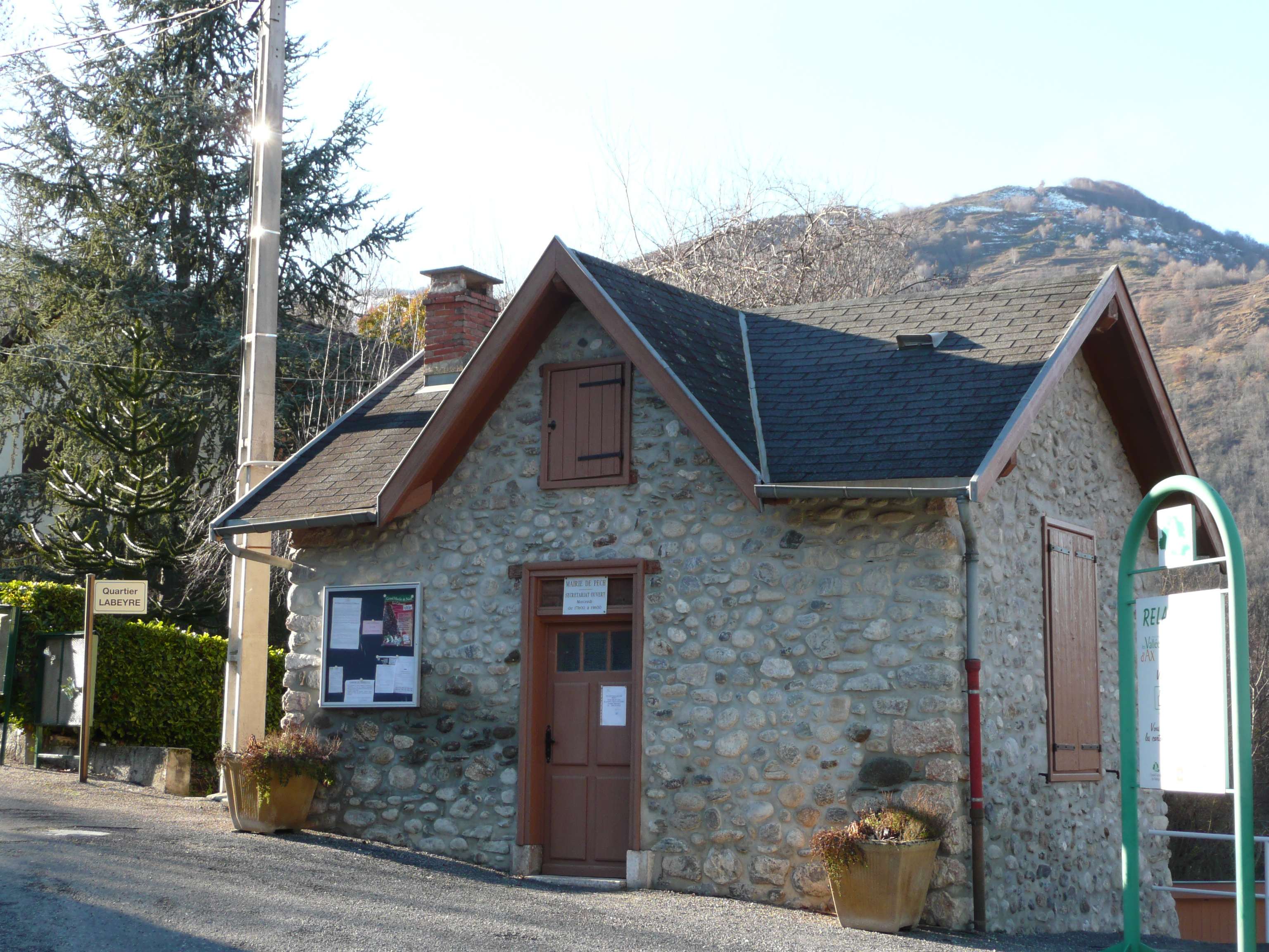 Mairie de Pech